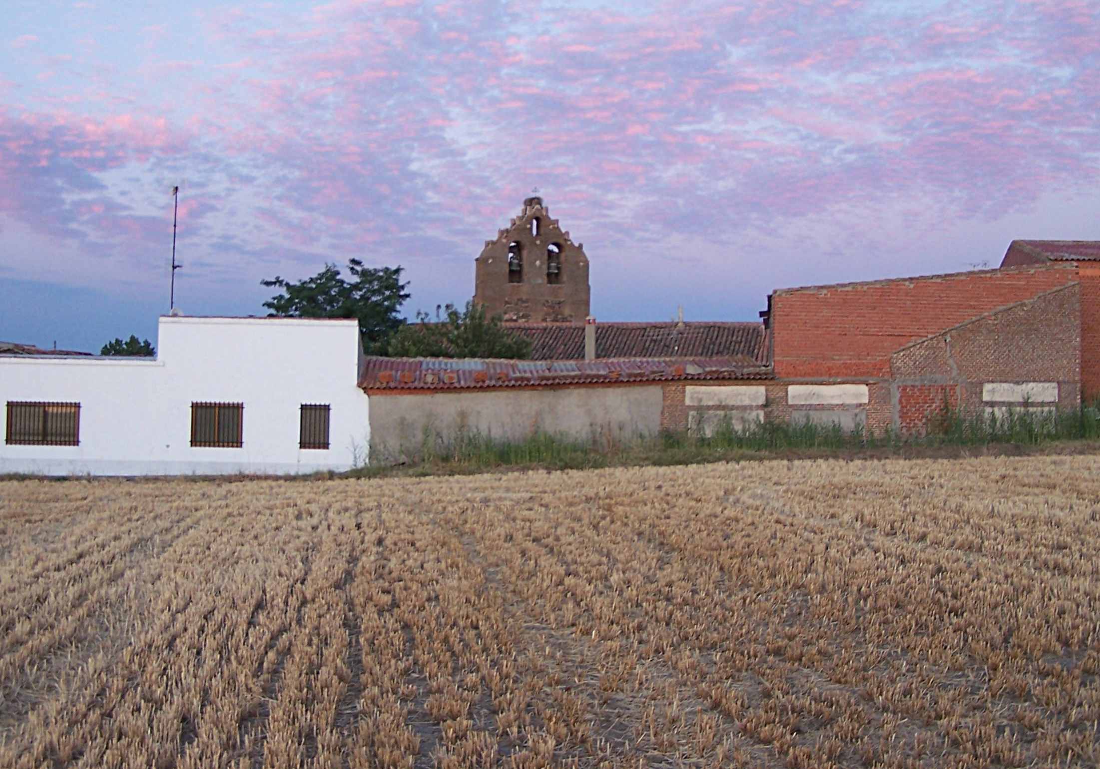 Espadaña de Pascualgrande